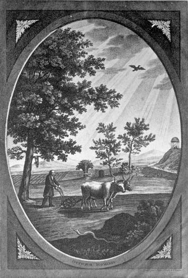 Самборский Андрей Афанасьевич. Морозов А.В. Каталог моего собрания русских гравированных и литографированных портретов. М., 1913, Т.4.